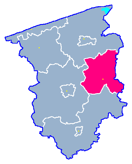 Locator maps for communes in województwo zachodniopomorskie : Brojce gm.png (podział na gminy)